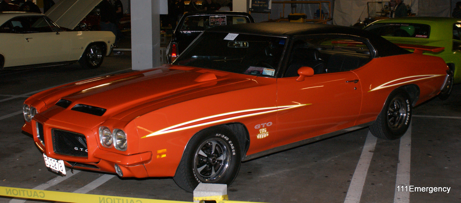 1971 Pontiac GTO